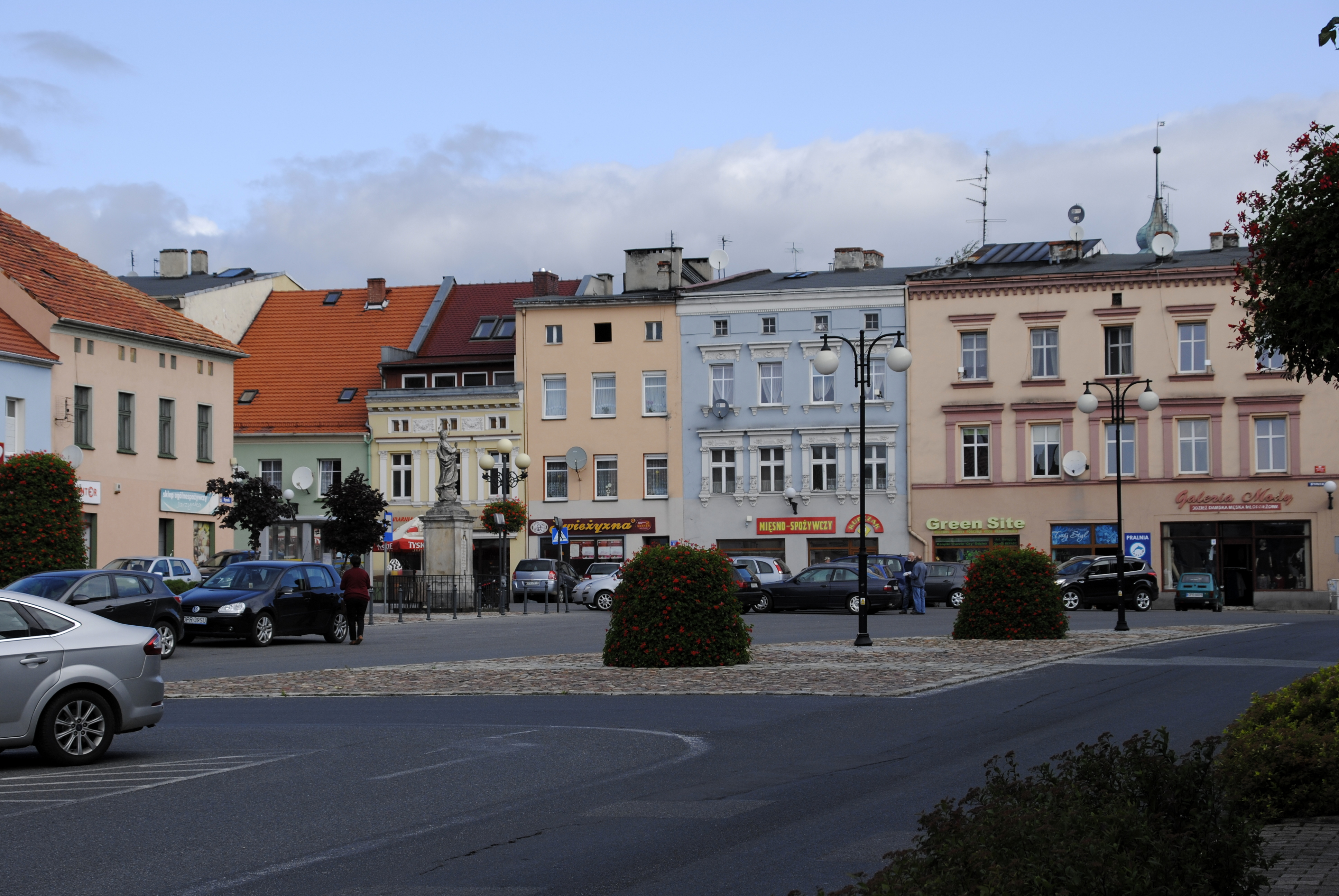 Ring in Zülz (Oberschlesien)